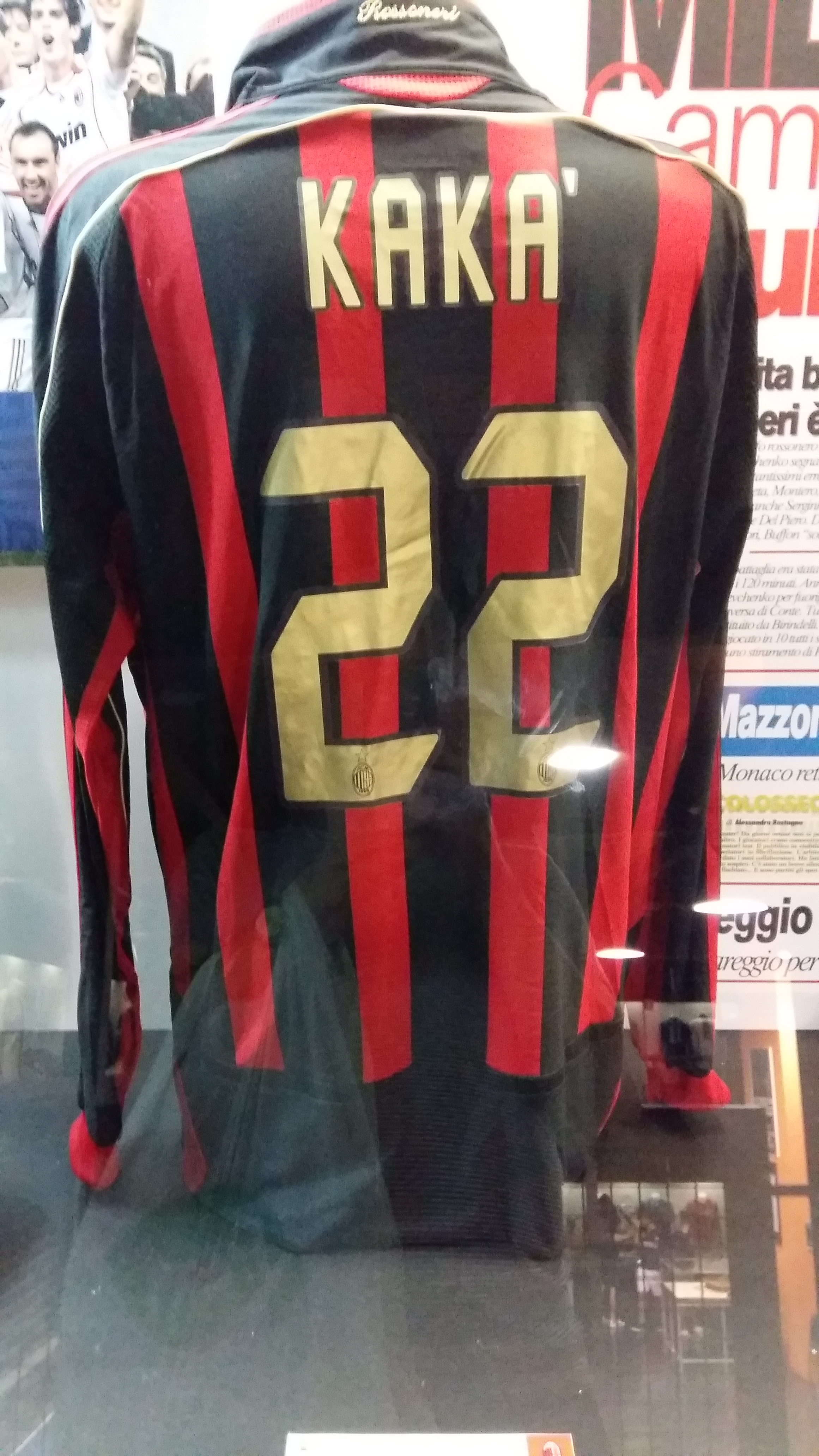 Футболка Кака в музее Сан-Сиро.